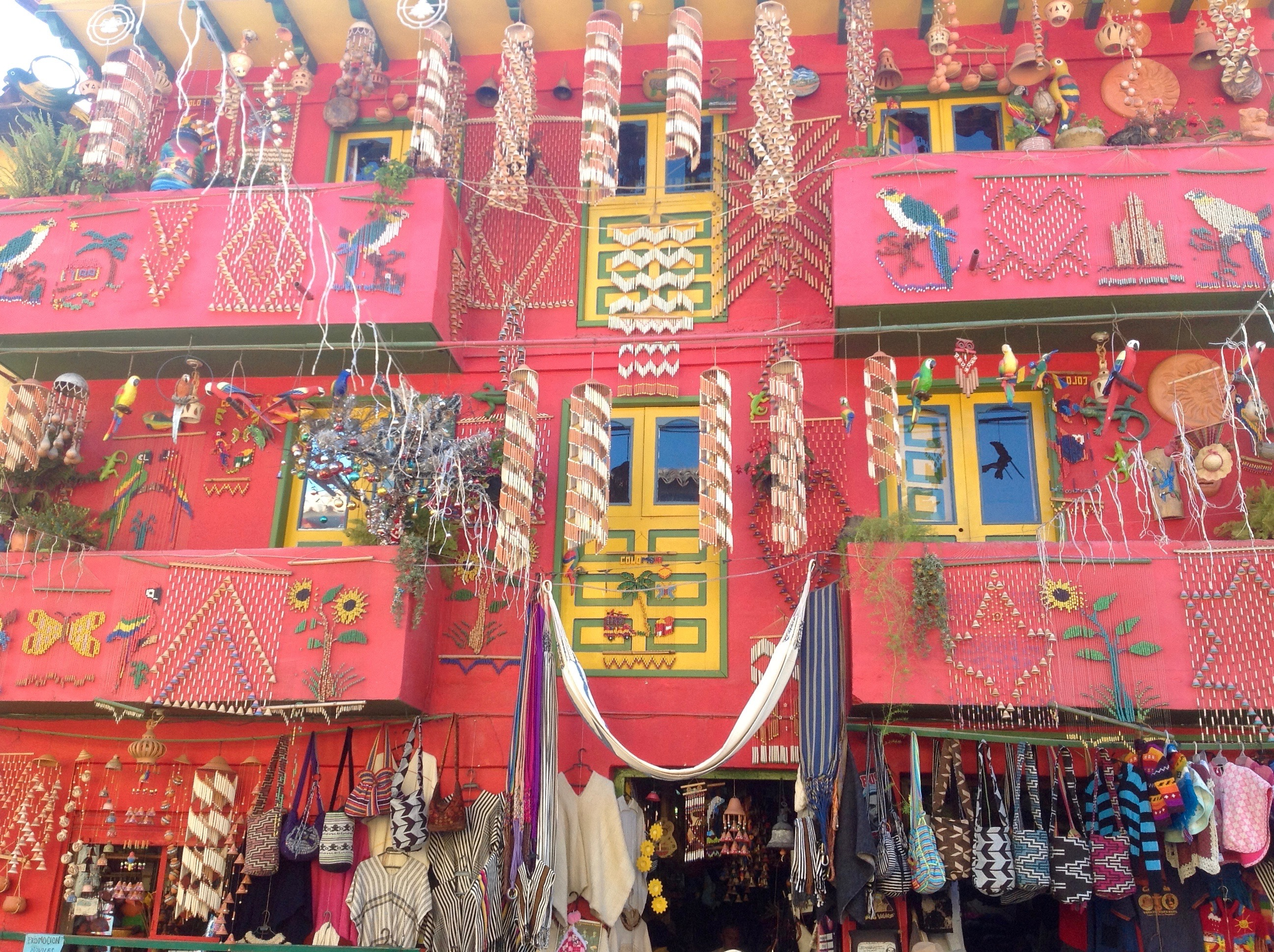 Excelentes piezas hechas por manos de artesanos colombianos. Esta fotografía fue tomada en el municipio colombiano con código 15599.